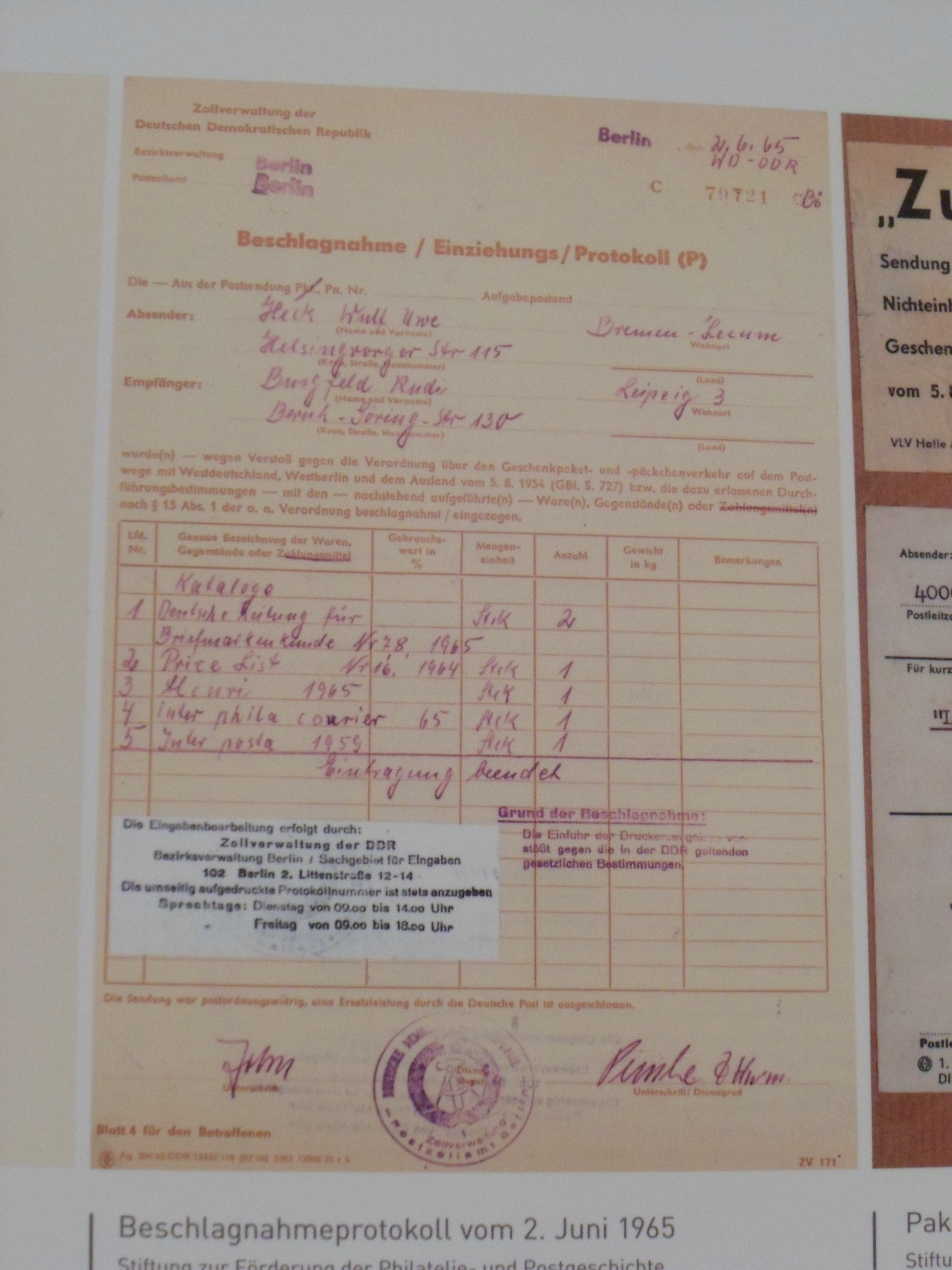 Hamburg, Speicherstadt, Deutsches Zollmuseum, Dokument aus der DDR-Zeit